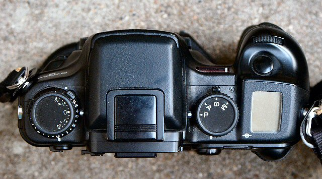 Motiv: Minolta Dynax 9 - Kamergehäuse, Aufsicht Aufnahmedatum: 23-Aug-2004 Fotografiert mit: Minolta Dimage 7 Hi